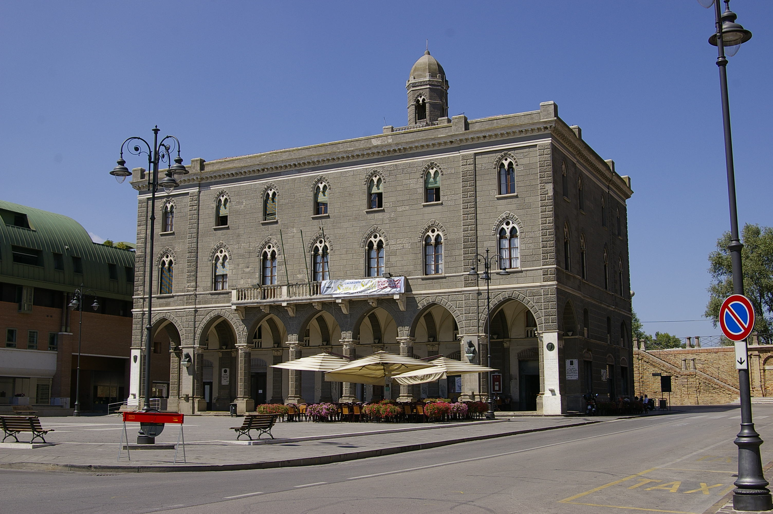 palazzo barbiani sede del municipio, vista del retro porticato. (1892)